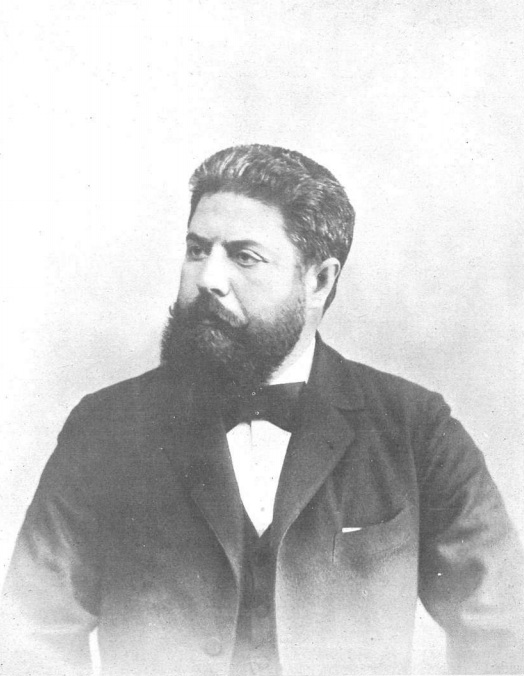 Retrato de Joaquín Costa, obra de Manuel Compañy, recogido en la revista española Actualidades.